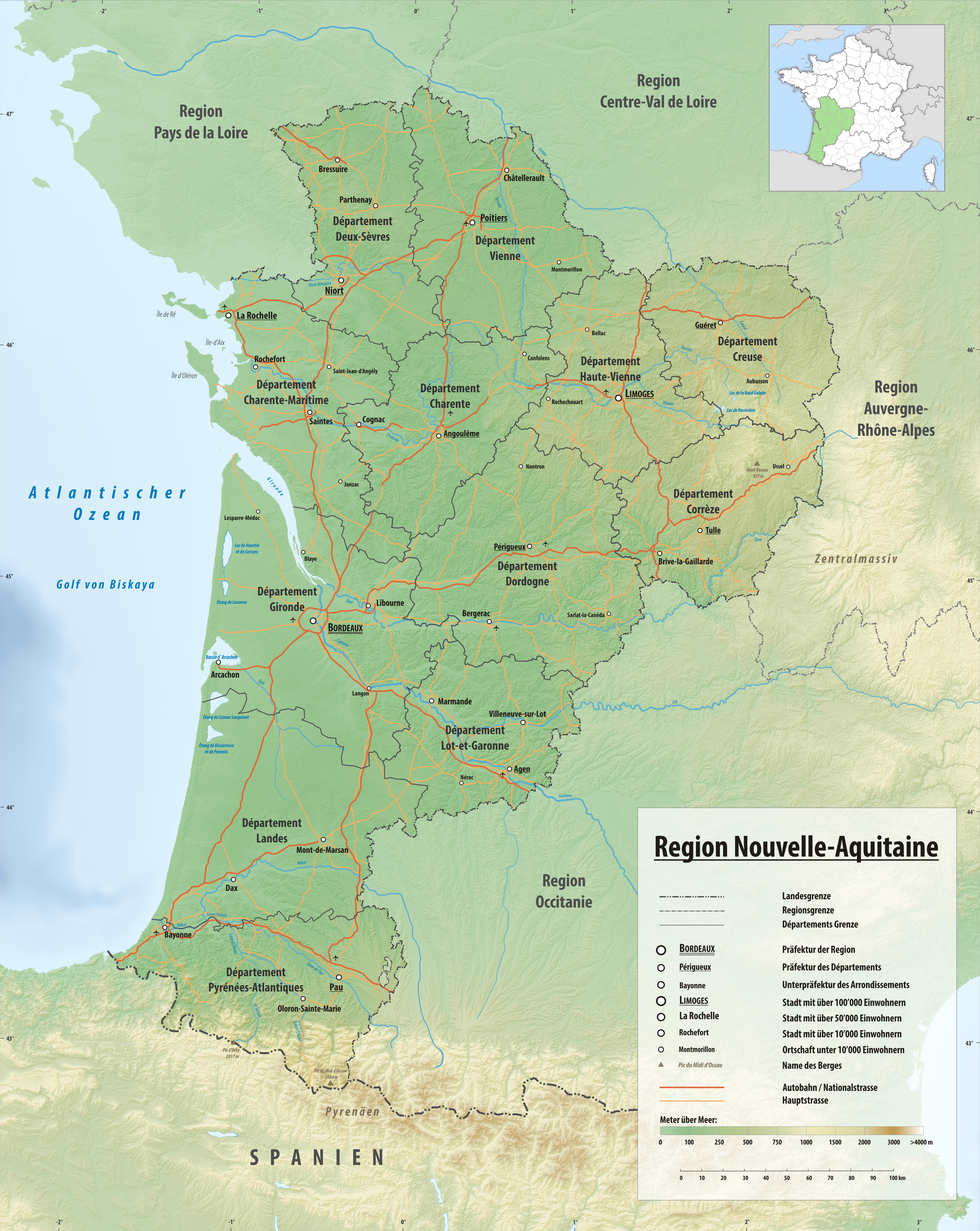 Reliefkarte der Region Nouvelle-Aquitaine Topographischer Hintergrund: NASA Shuttle Radar Topography Mission (public domain). SRTM3 v.2.